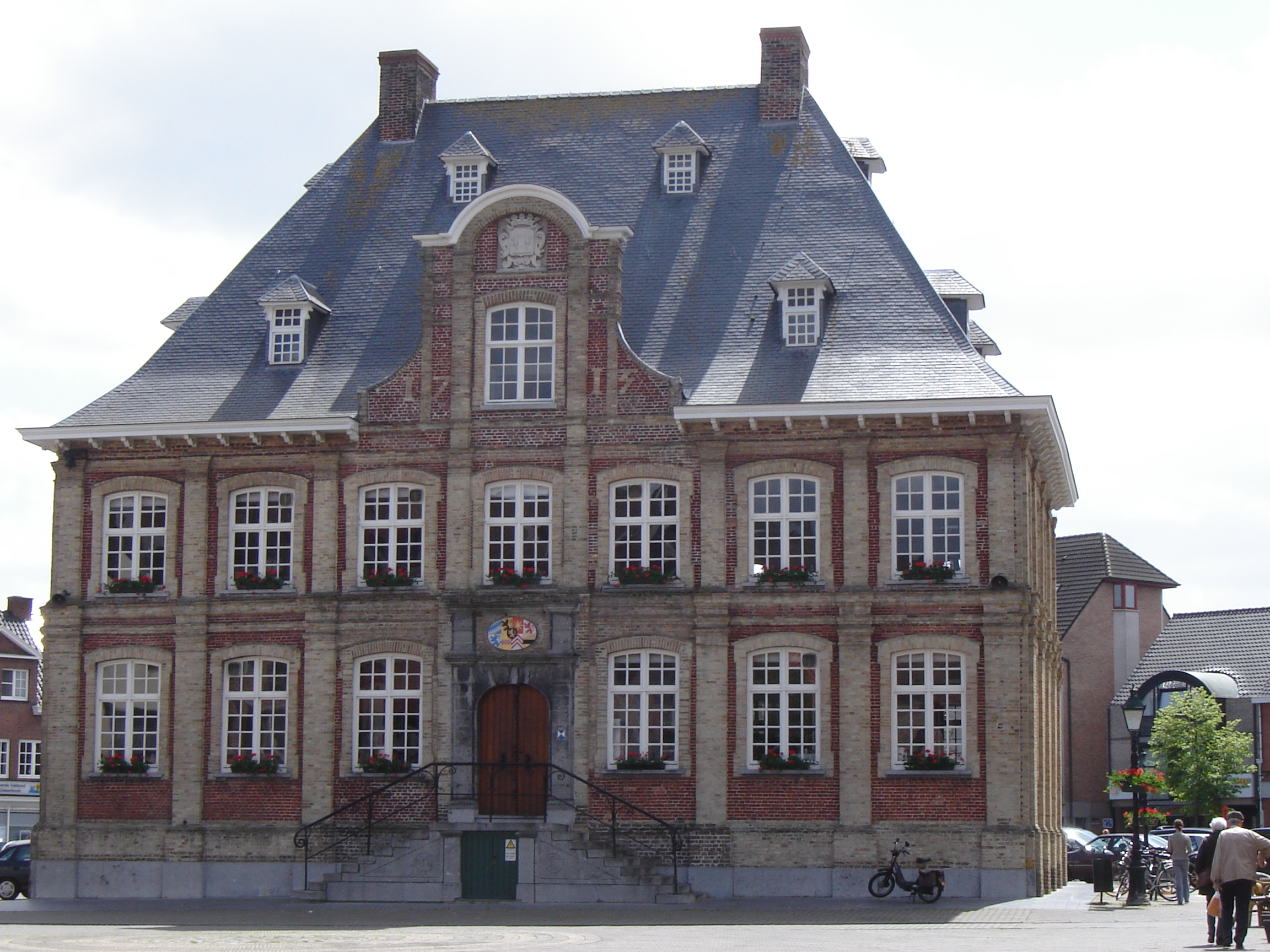 Stadhuis van Torhout (voorgevel)City hall of Torhout (front). Torhout, West Flanders, Belgium